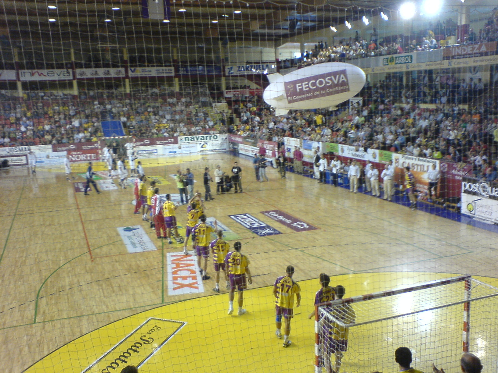 Partido de la Liga ASOBAL correspondiente a la segunda jornada que enfrentó al BM Valladolid y al BM Ciudad Real